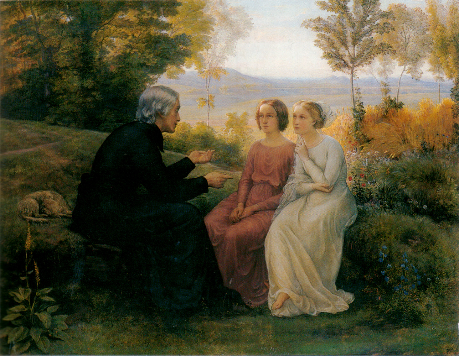 Poème de l'âme (9)